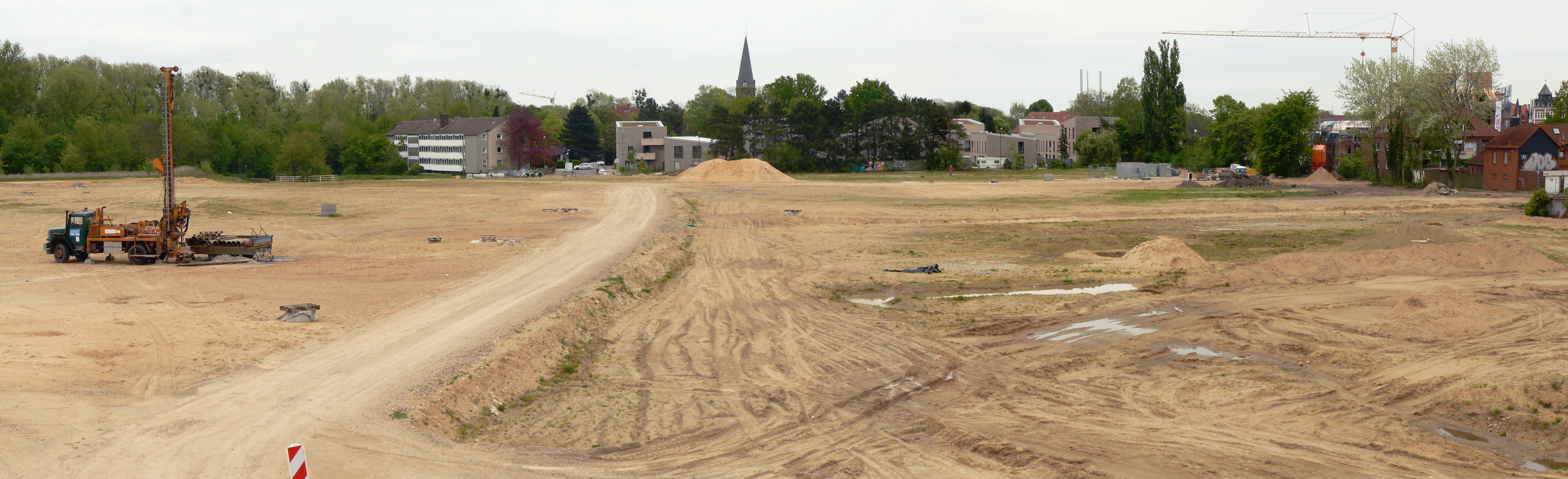 Sandfläche der Wasserstadt Limmer im Osten